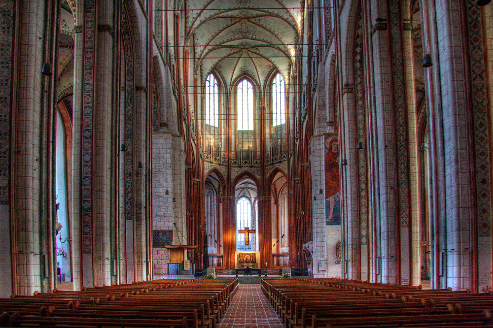 Lübeck, Marienkirche